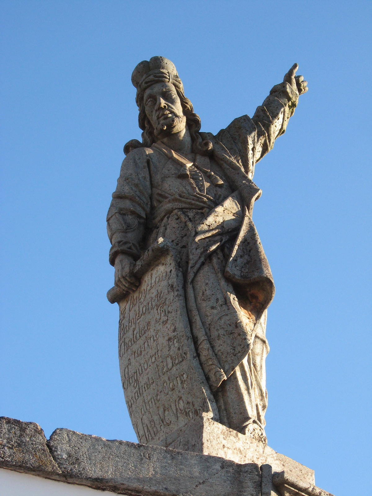 Profeta Habacuc - Doze profetas de Aleijadinho Congonhas Minas Gerais